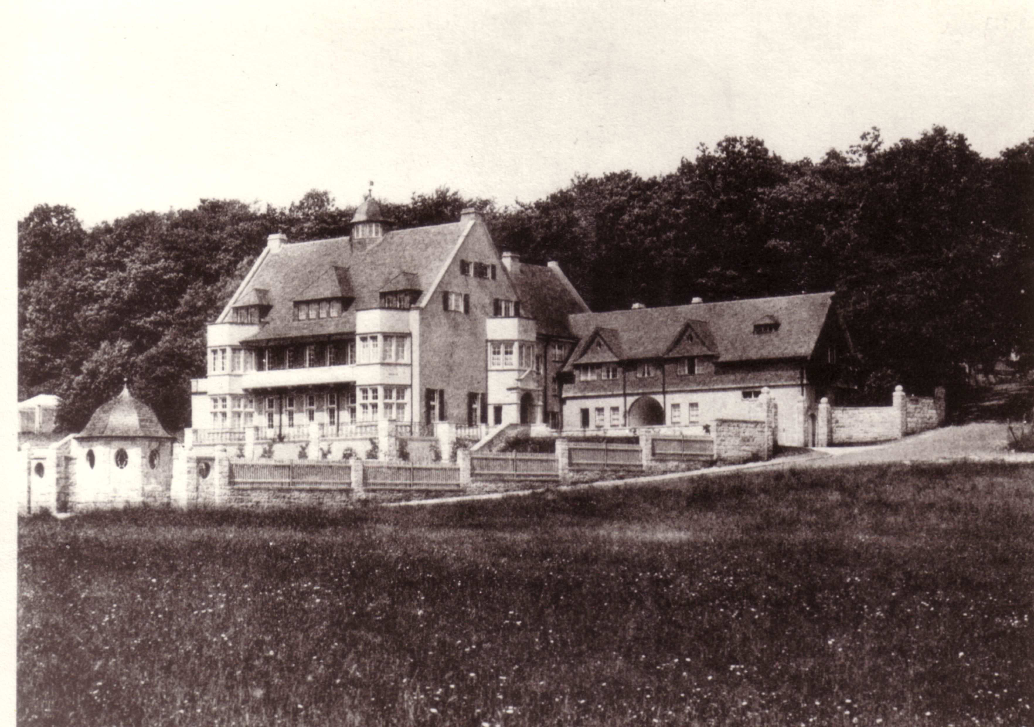 Blick auf die Villa Strombeck 1912